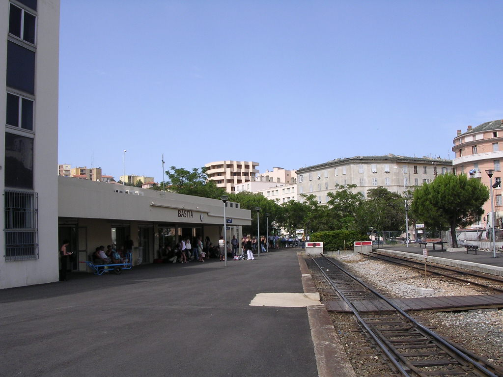 France Corse Gare de Bastia